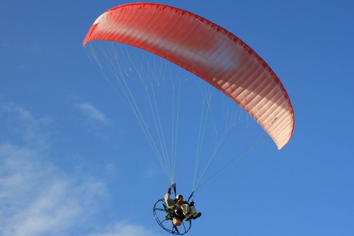 Парамотор и парамплан компани EX-AIR